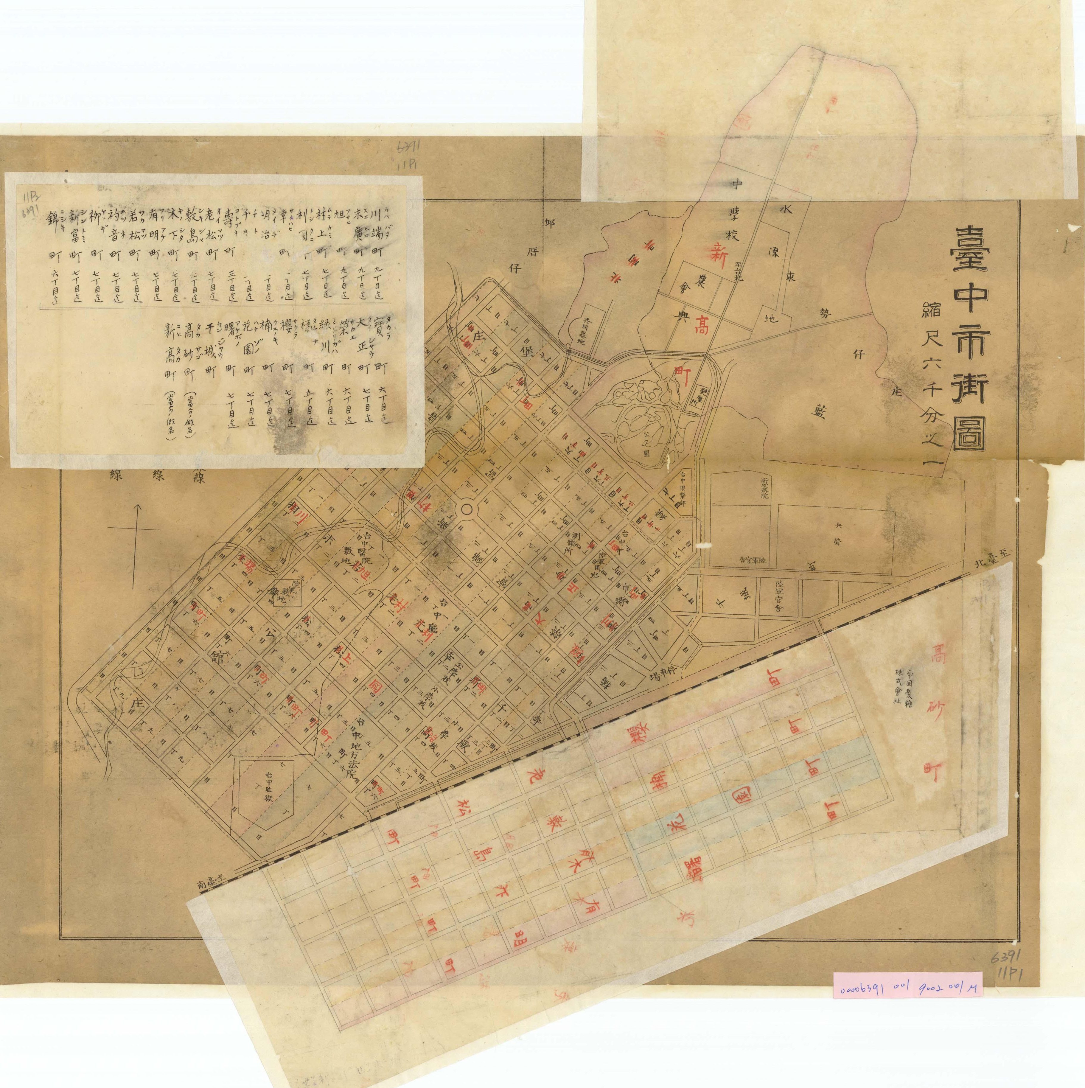 1916年公佈的30個臺中市通稱町名，分別為橘町、綠川町、榮町、大正町、寶町、錦町、新富町、柳町、初音町、若松町、末廣町、旭町、村上町、利國町、幸町、明治町、千歲町、壽町、老松町、敷島町、木下町、有明町、曙町、花園町、楠町、櫻町、高砂町、干城町、新高町、川端町。